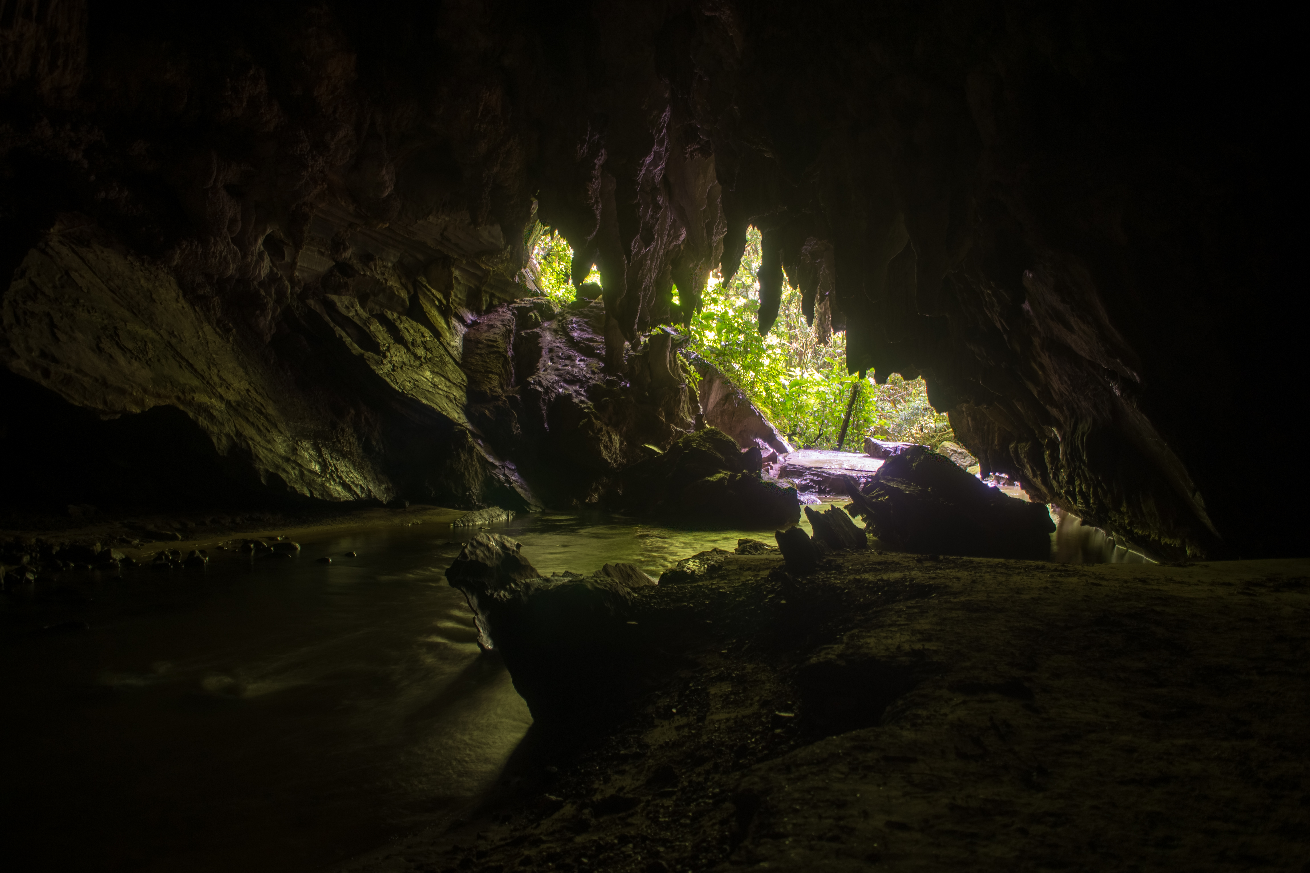 Caverna da Água Suja, por Leonardo Palermo Gentile, feita na expedição PETAR, fevereiro 2020